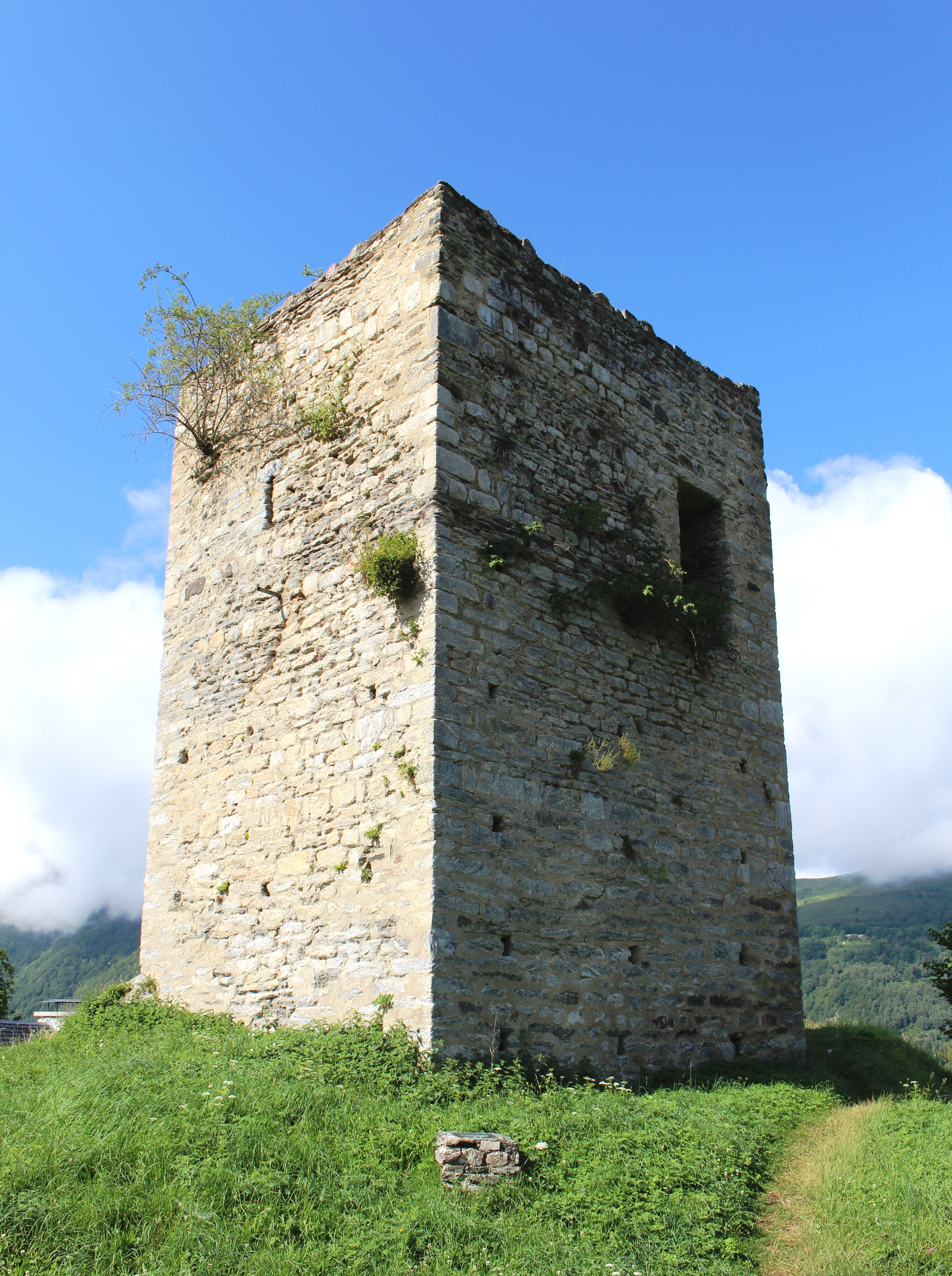 Château de Loudervielle (Hautes-Pyrénées)